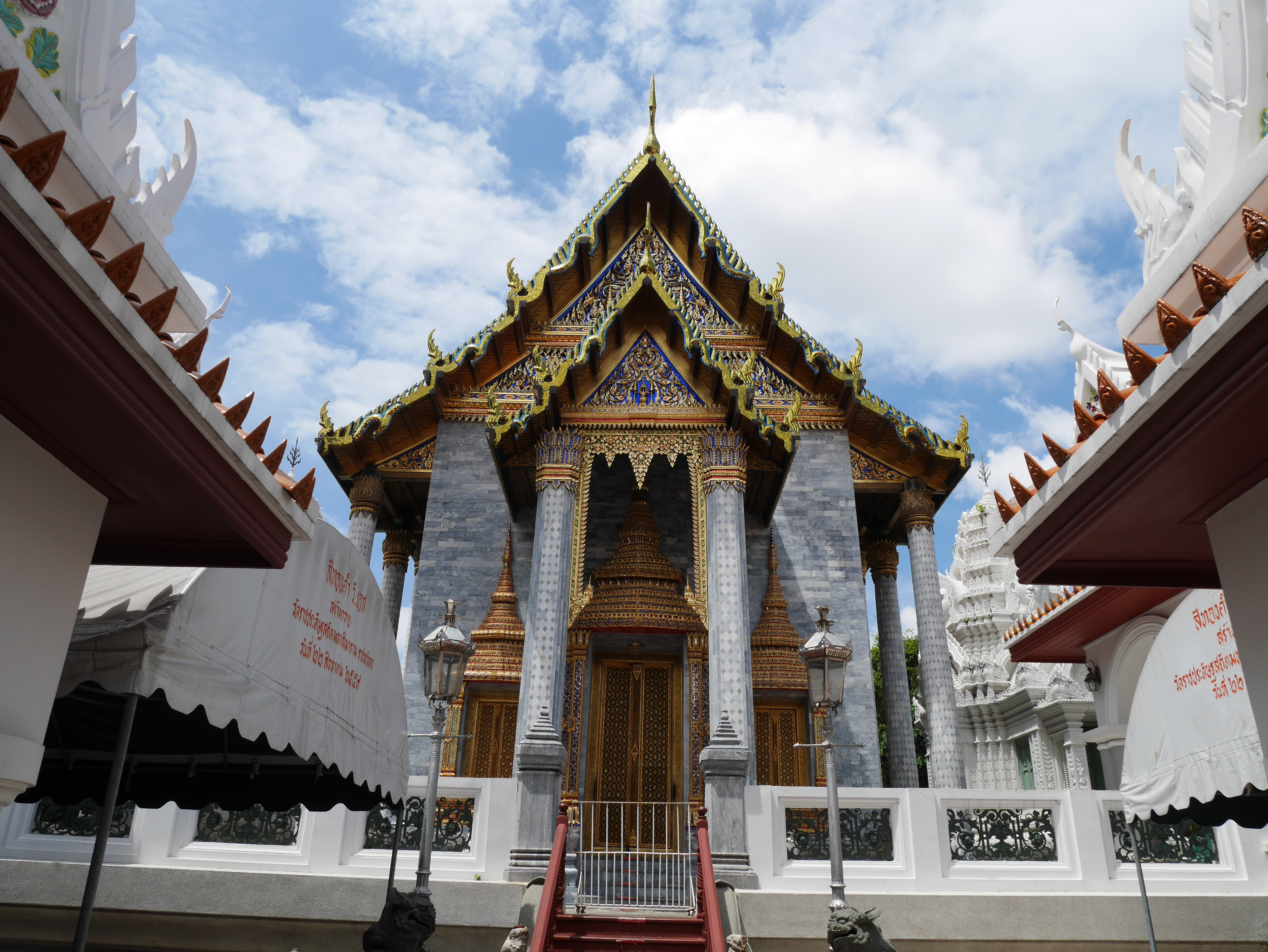 วัดราชประดิษฐสถิตมหาสีมาราม